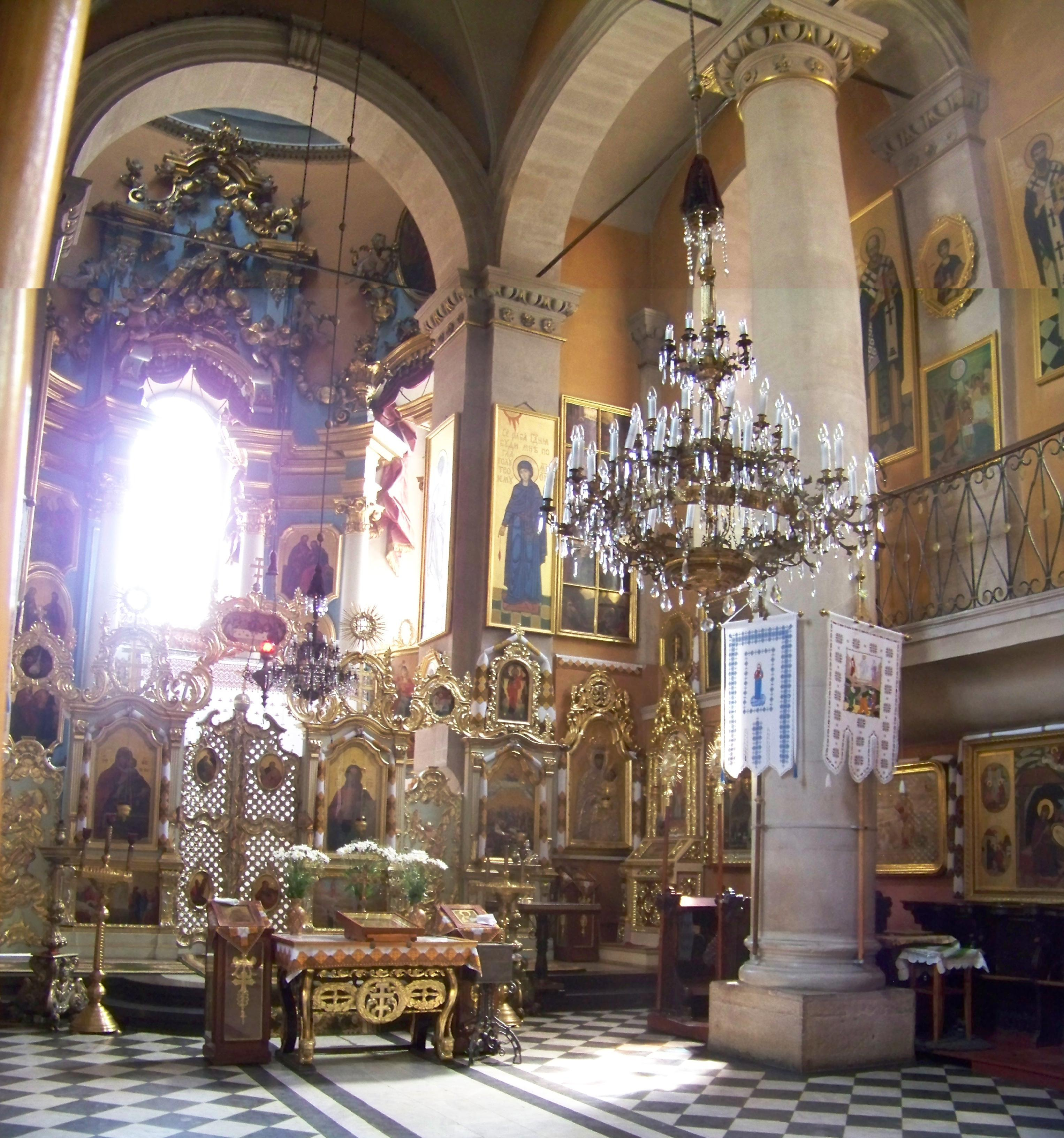 церква Успенська, Львів, Руська Іконостас